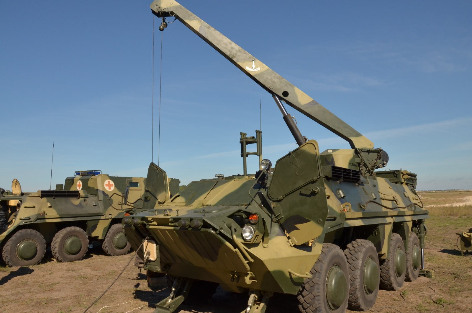 понад 50 представників 30 держав-учасниць ОБСЄ і 20 членів Київської асоціації військових аташе відвідали 169 навчальний центр Сухопутних військ Збройних Сил України (смт Десна, Чернігівської області), де ознайомилися із новими типами зброї та військової техніки, які були прийняті на озброєння української армії протягом останніх років. Зокрема, на військовому полігоні центру відбулася демонстрація бронетранспортера БТР-4Е, командирського варіанту бронетранспортера БТР-4К, броньованої ремонтно-евакуаційної машини БРЕМ-4РМ, броньованої санітарно-евакуаційної машини БММ-4С, 120-мм міномету М120-15 «Молот». Також під час заходу офіцери Центру розвитку та супроводження матеріального забезпечення Збройних Сил України представили інспекторам ОБСЄ зразки військової форми одягу, спорядження, засобів індивідуального захисту та сучасні набори харчування українських воїнів. Співробітник центру попередження конфліктів ОБСЄ Роберт Мосінков, який був обраним речником групи відвідувачів, подякував офіцерам Управління верифікації Генерального штабу ЗС України за відкритість, оперативність та надану змістовну інформацію, що цікавила інспекторів. — Захід пройшов вдало і повністю відповідав Віденському документу. Ми задоволені тим, яку відкритість виявила Україна. Це є черговим внеском у справу розбудови довіри і безпеки між державами, — наголосив Роберт Мосінков.